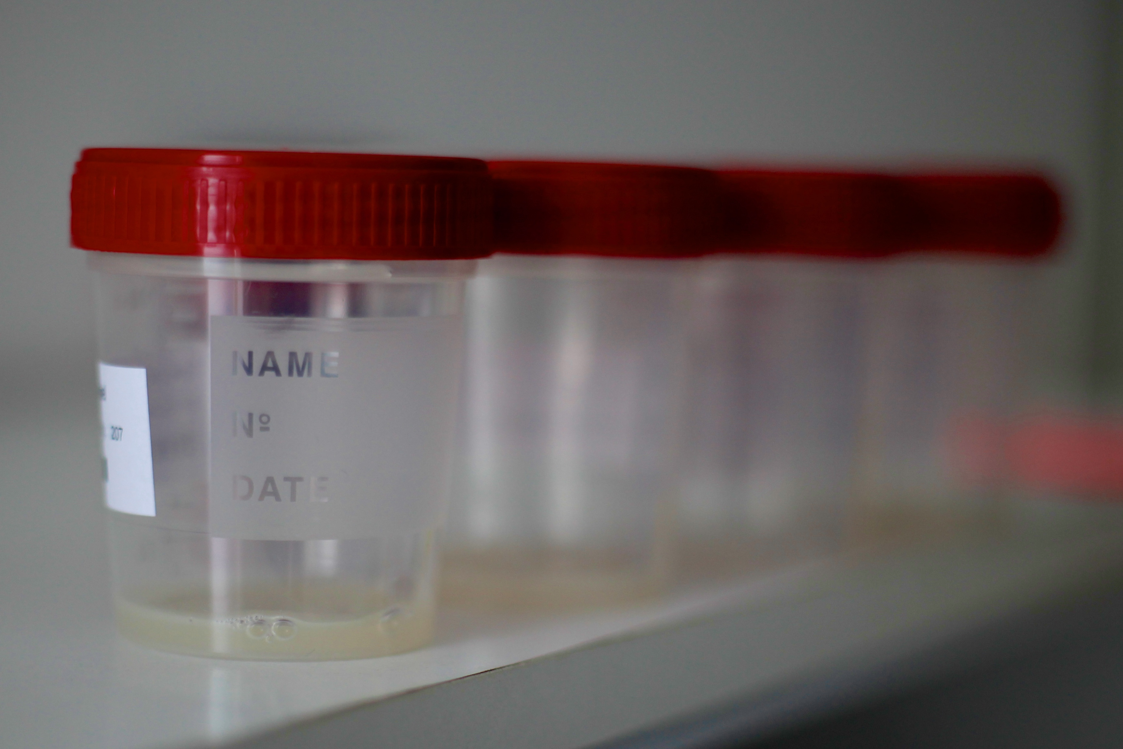 ilustrační foto ISCARE